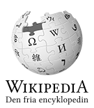 Wikipedia logo 2.0 (sv)